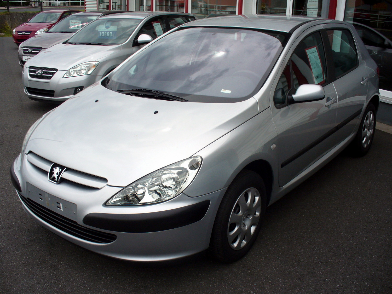 Peugeot 307